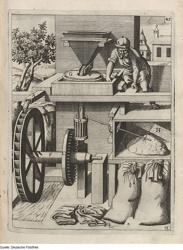 Original image description from the Deutsche Fotothek Mechanik & Mühle & Mahlwerk & Wassermühle & Wasserrad